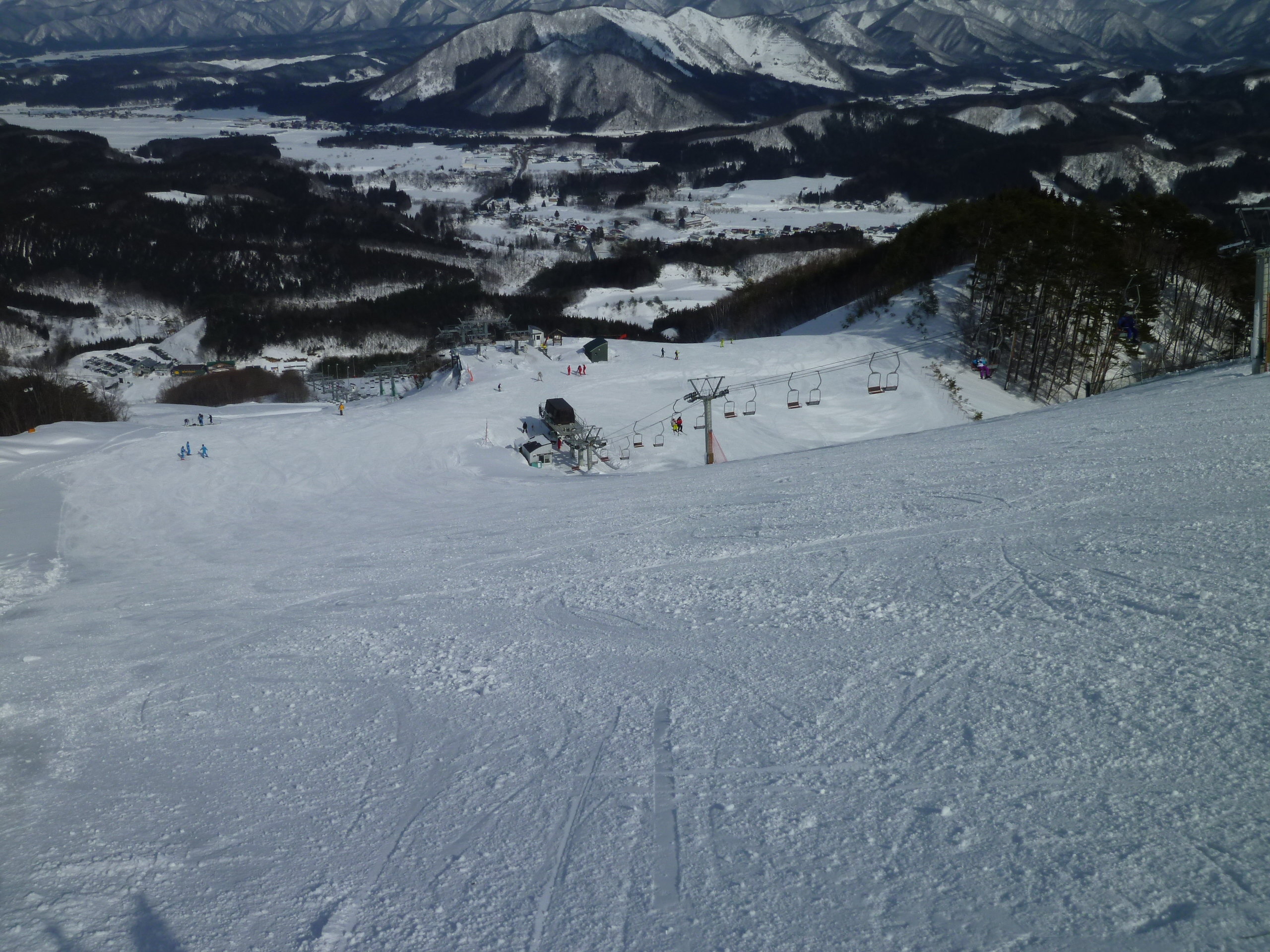 山形県最上町赤倉温泉スキー場。山頂スタートハウス付近から撮影。